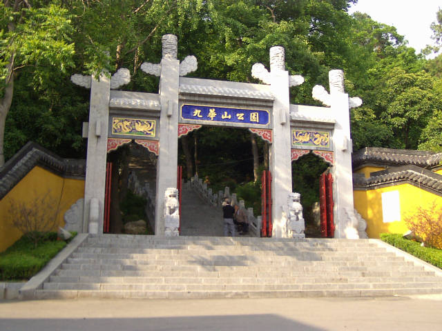 九華山公園 山門 2004年4月28日撮影 撮影者：権作 参照：